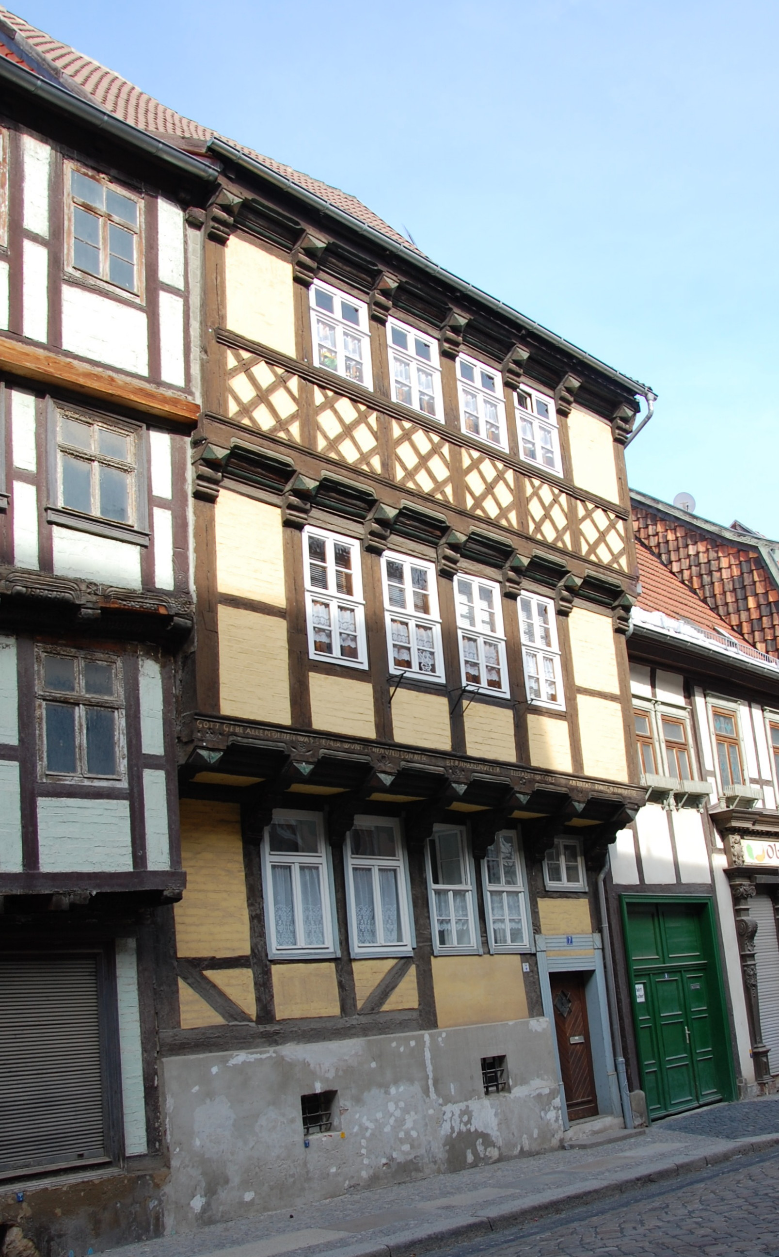 Haus Breite Straße 7 in Quedlinburg